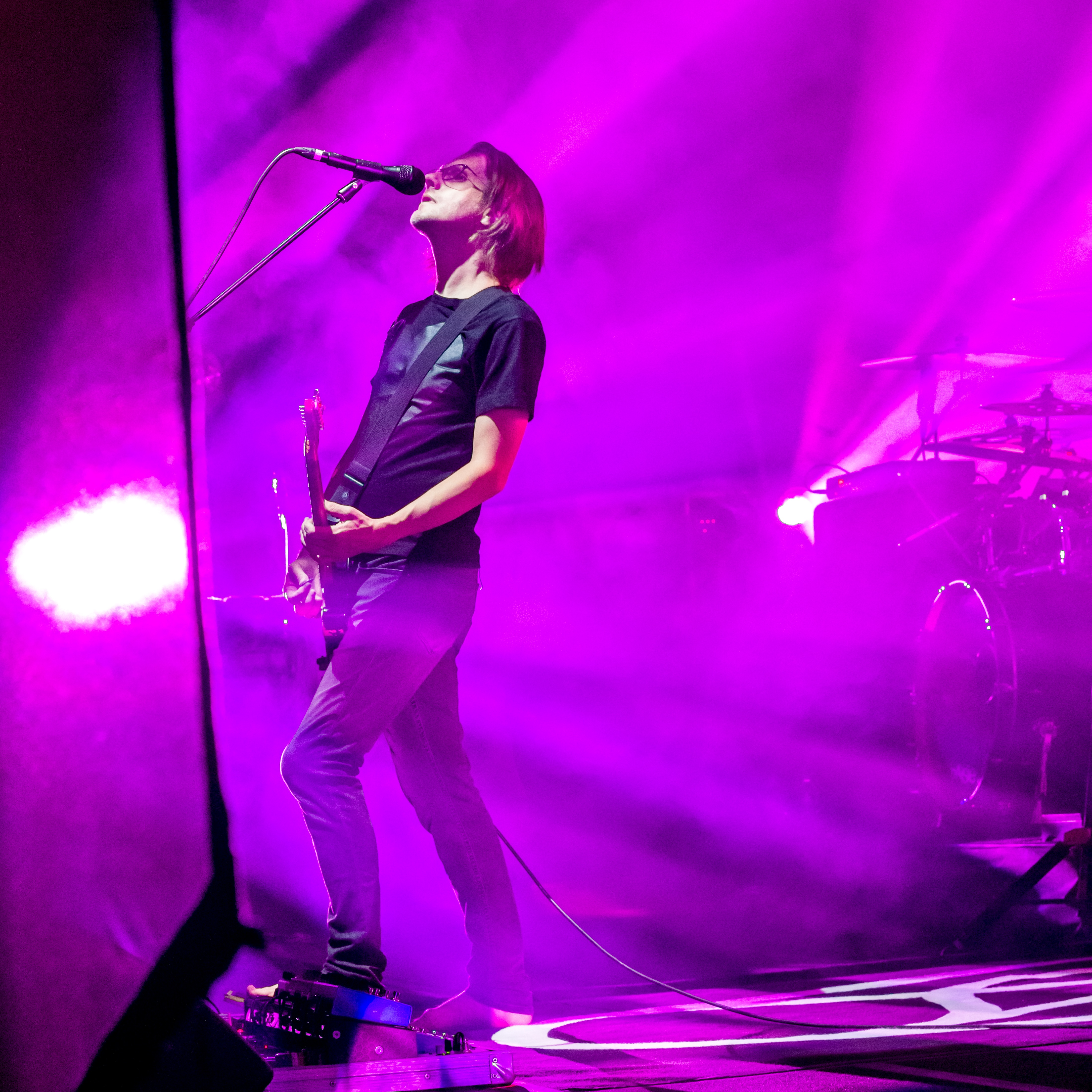 Bilder vom Zelt Musik Festival 2018 in Freiburg im Breisgau Das Eröffnungskonzert mit Steven Wilson